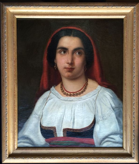 foto